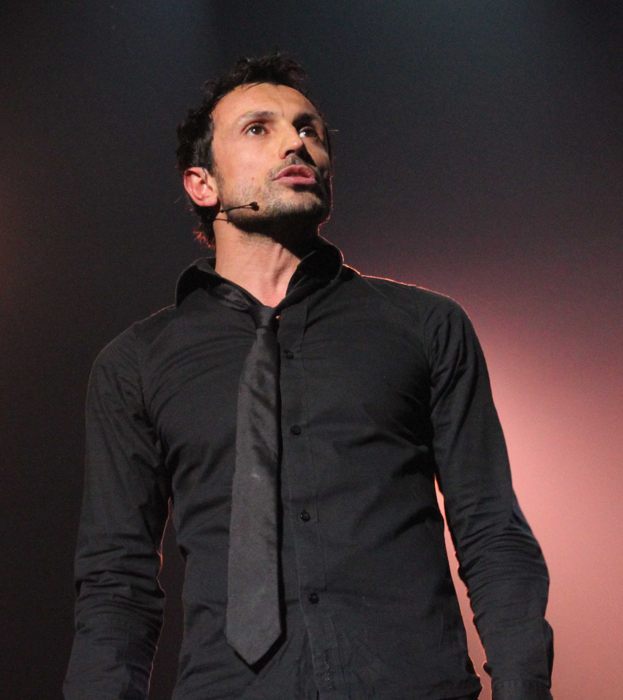 Willy Rovelli lors du spectacle "Willy en grand", au Bataclan